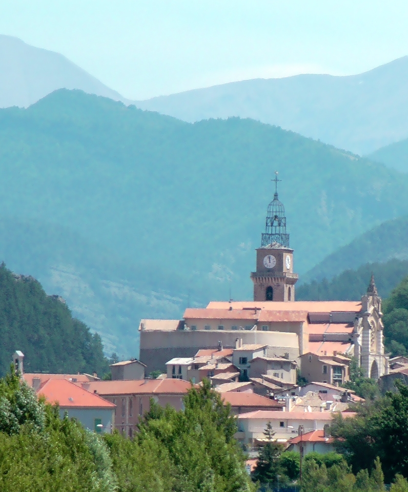 Vue générale du centre ville de Digne les bains